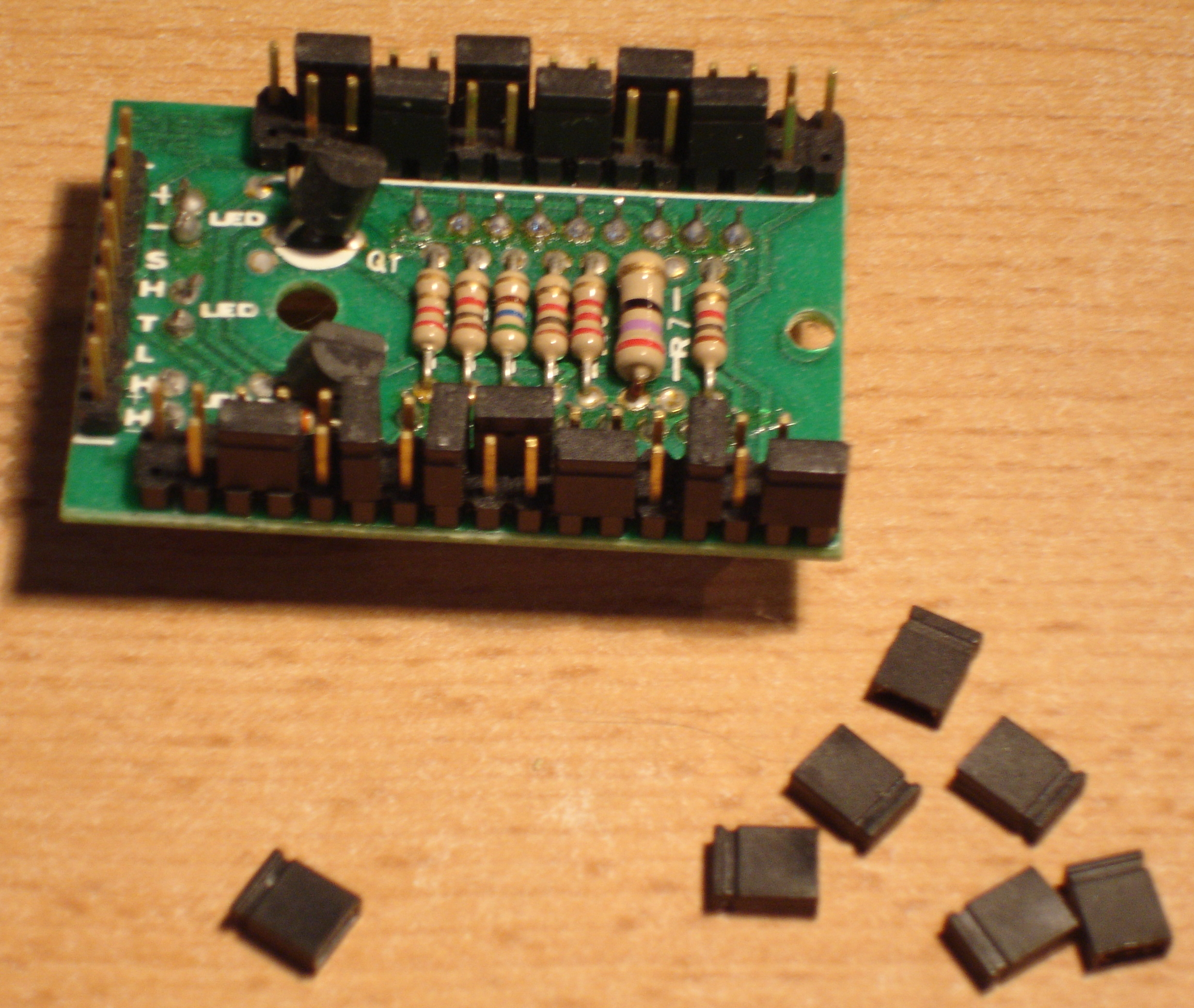 Jumpers